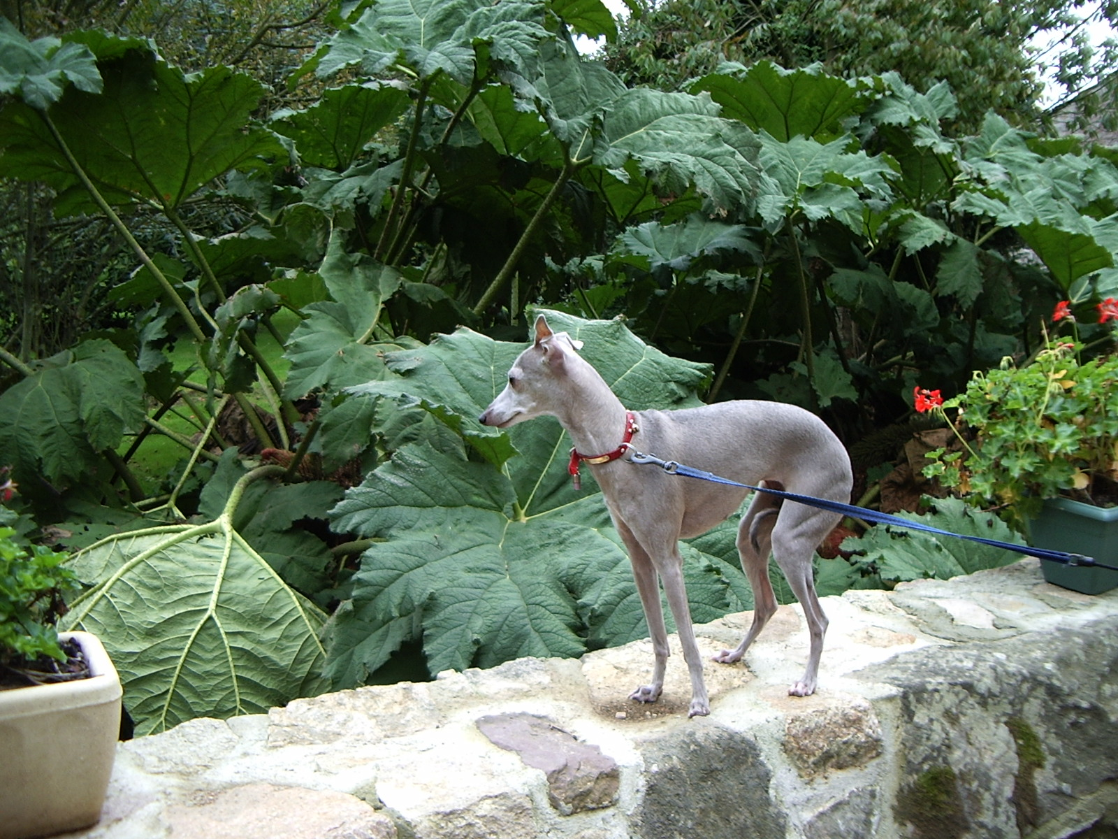 photo d'un petit lévrier italien gris, adulte §Licensing Catégorie:Chien de course